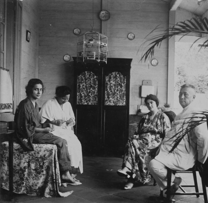 foto. Gezelschap bijeen op de galerij van een huis